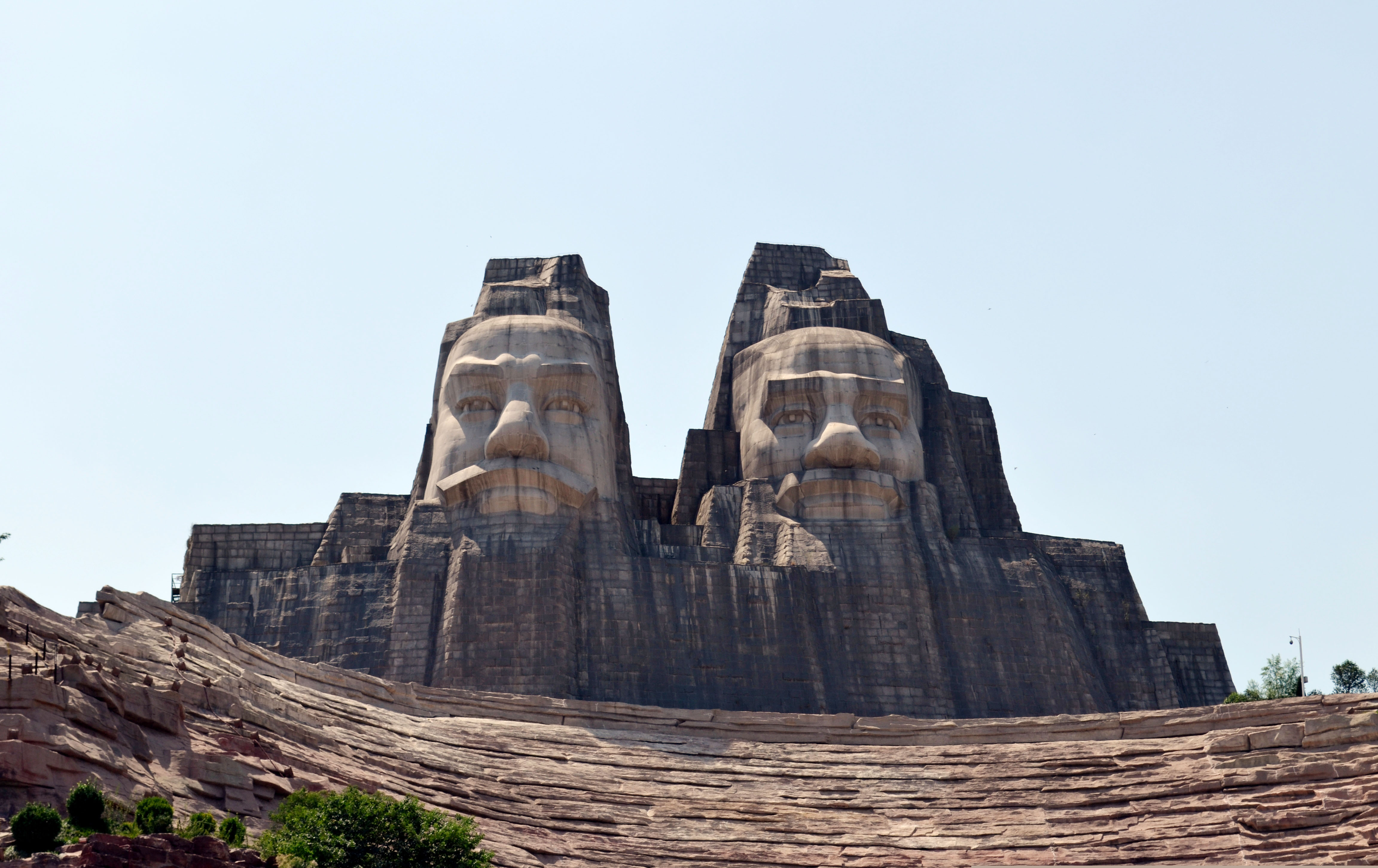 中文（中国大陆）: 主体为郑州黄河风景名胜区炎黄二帝巨型雕像